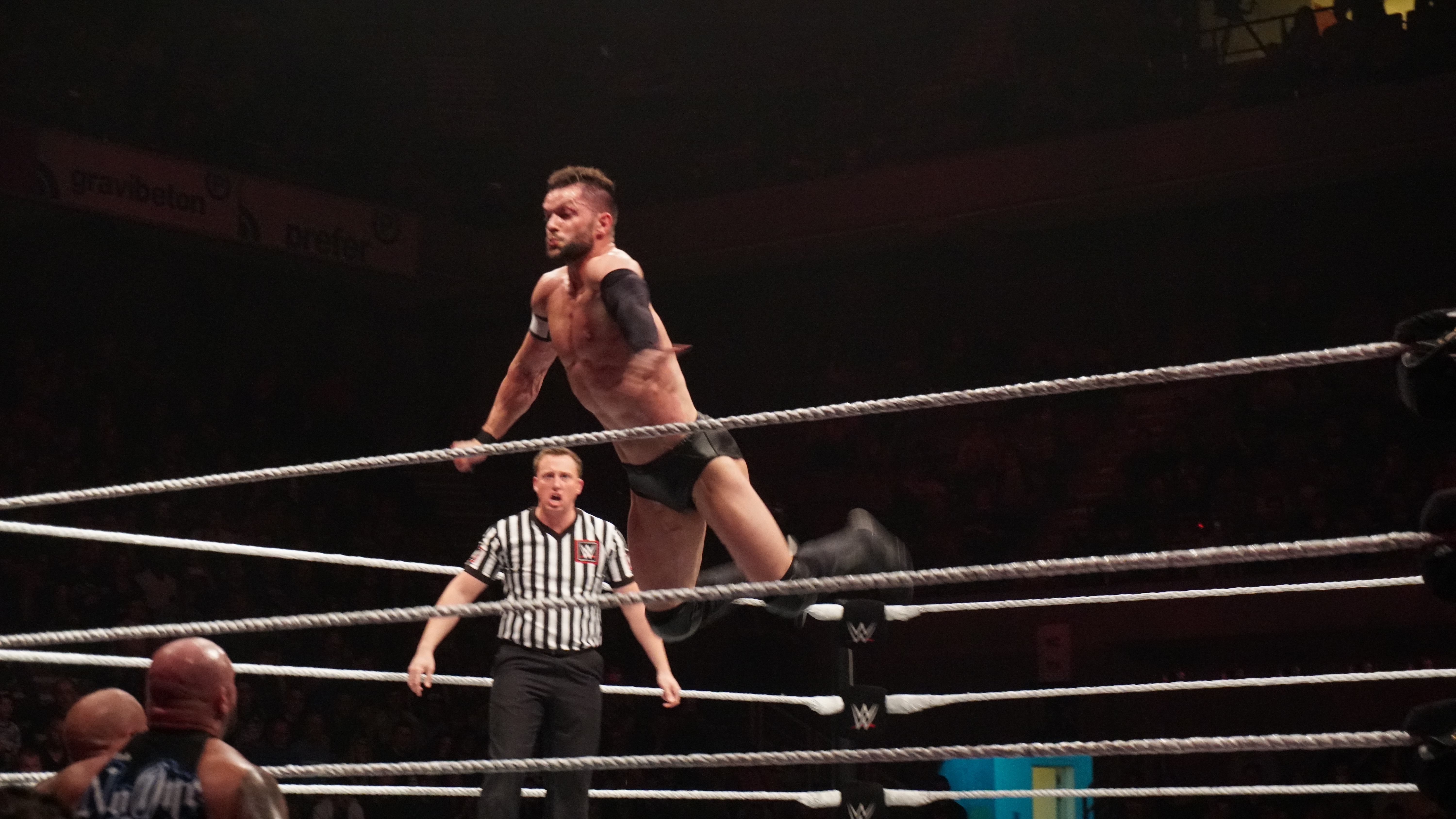 Finn Balor defeats Karl Anderson (With Luke Gallows) ( Le vendredi 12 mai, la WWE Live Tour fera escale au Country Hall a Liege pour le spectacle de catch de l'annee! Au programme: des duels impitoyables et des rencontres captivantes entre les meilleures equipes et les plus grands rivaux. )